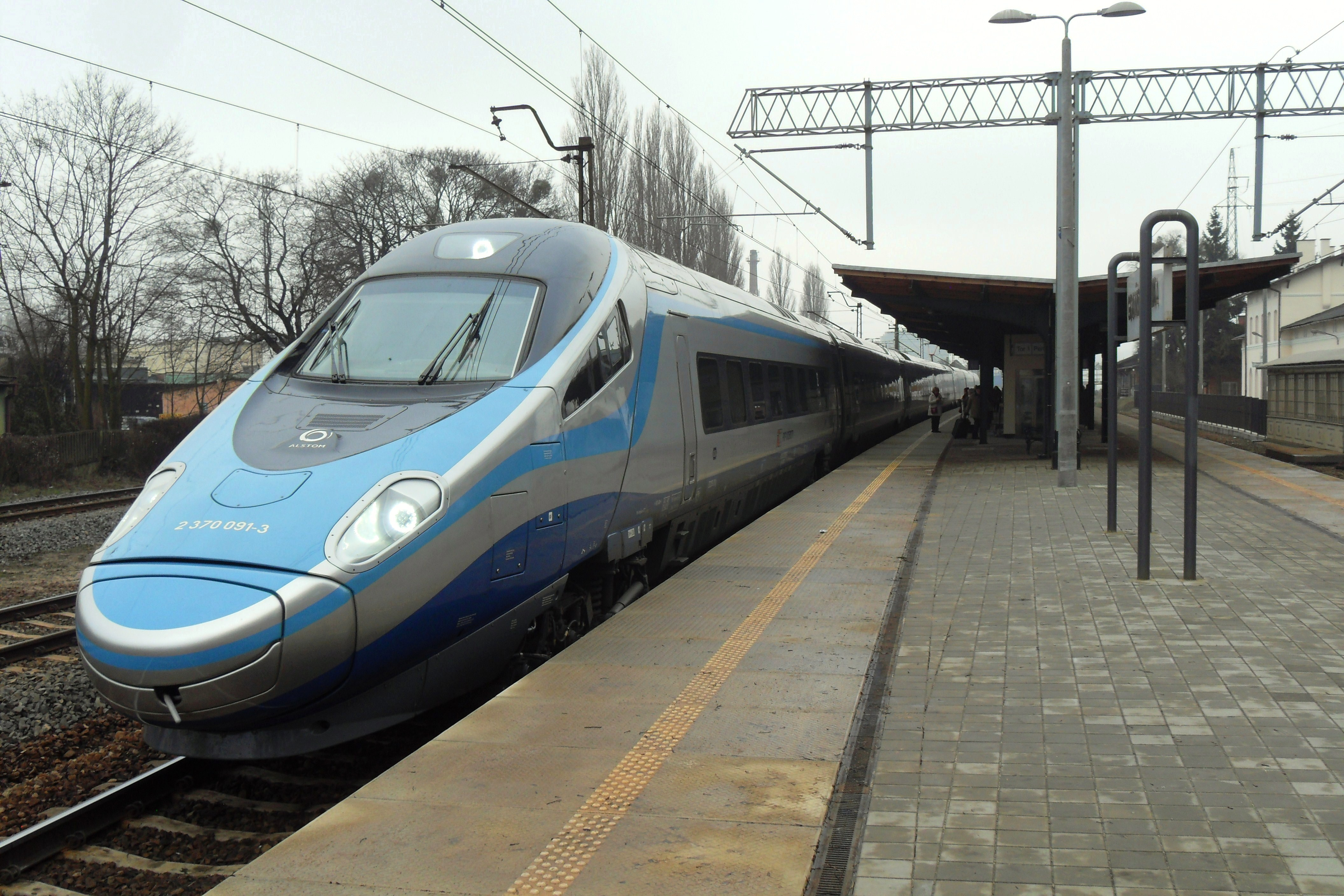 Stacja Gdańsk Oliwa, peron dalekobieżny i Pendolino (Express InterCity Premium).